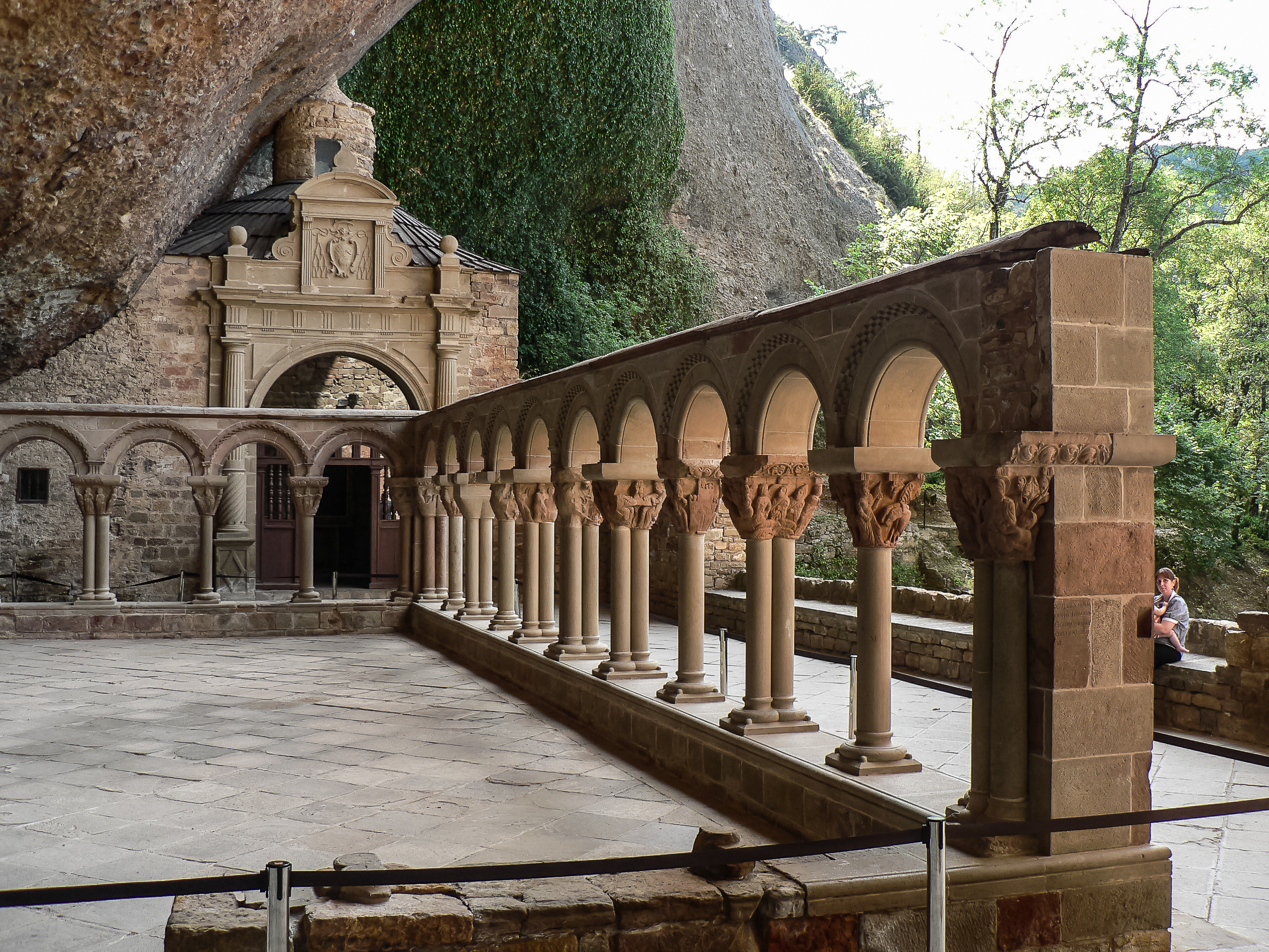 CS 22082009 #164629 #45681.jpg